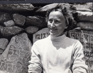 Claude Kogan devant un mur à prières lors de l'expédition féminine de 1959 au Népal.